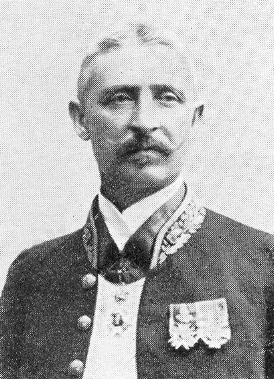 Oscar Jacobsen (1850-1902)